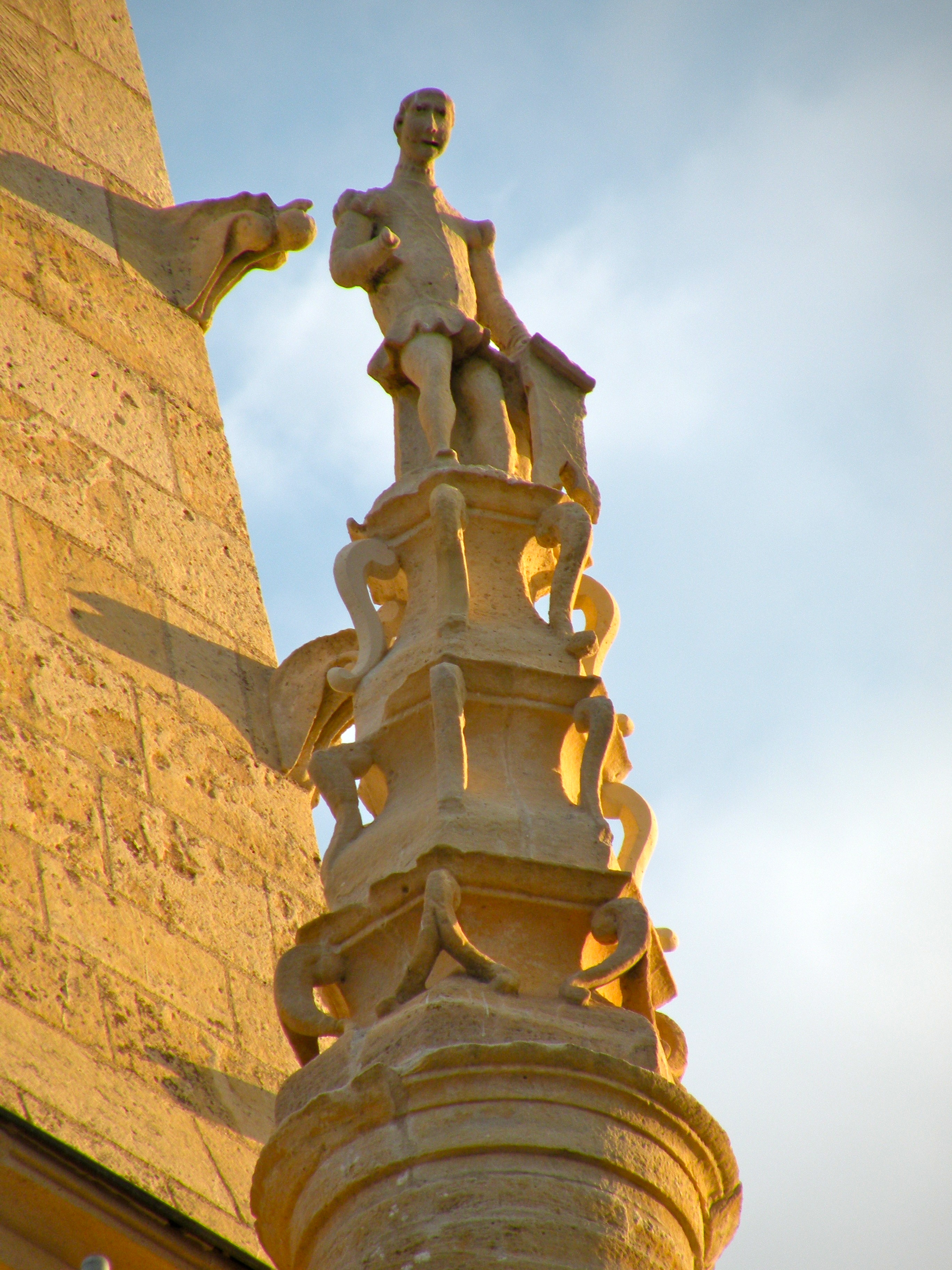 Église Saint-Crépin-et-Saint-Crépinien de Saint-Crépin-Ibouvillers